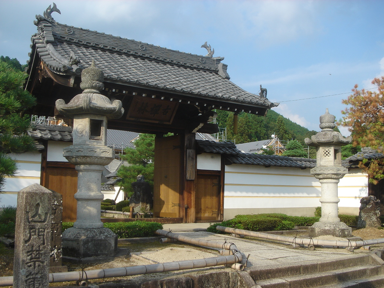 Gukeiji(Temple)(愚渓寺),Mitake,Gifu,Japan(岐阜県御嵩町)で撮影。